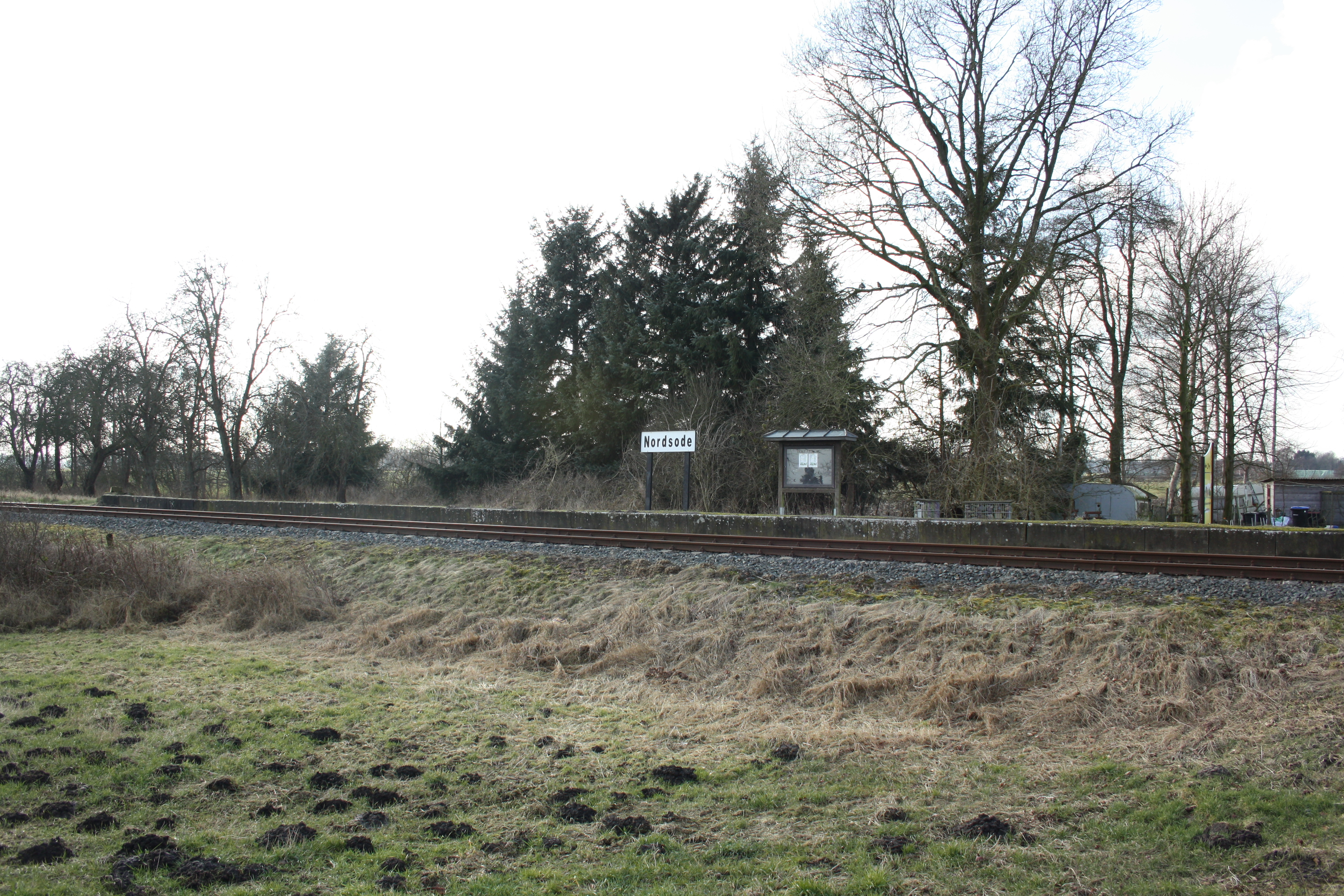 Bahnhof Nordsode des Moorexpress, Landkreis Osterholz